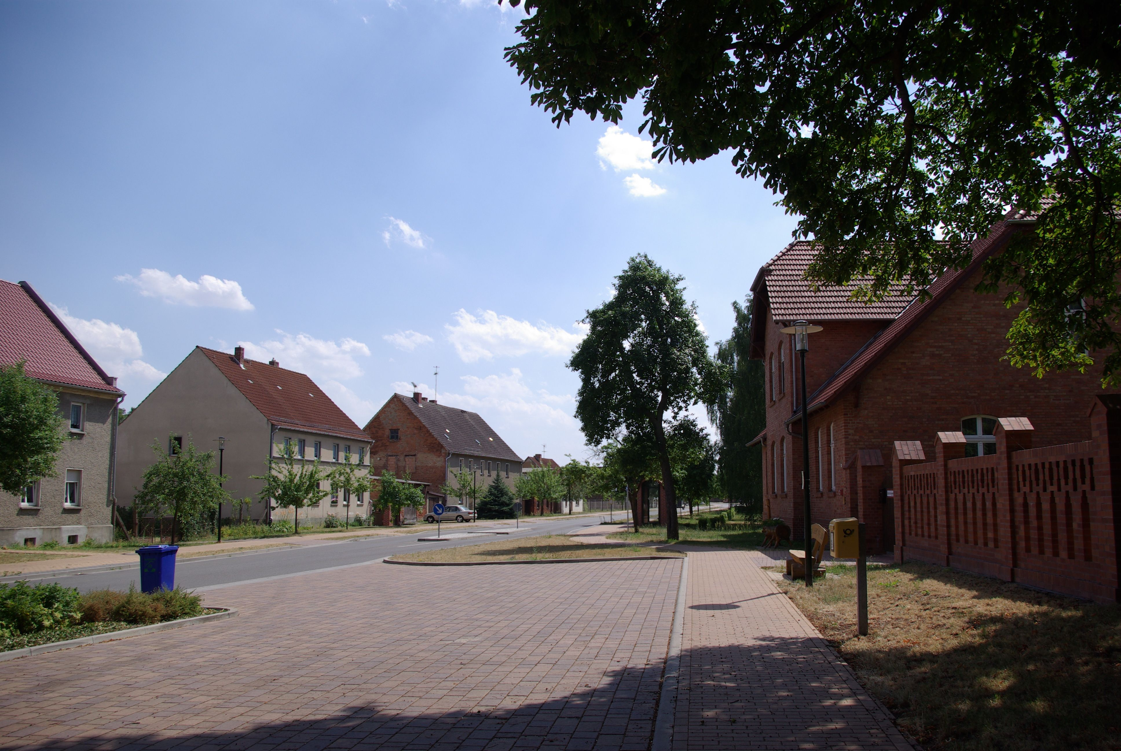 Jüterbog Ortsteil Neuheim in Brandenburg. Die Straße in Neuheim, rechts liegt die Kirche.